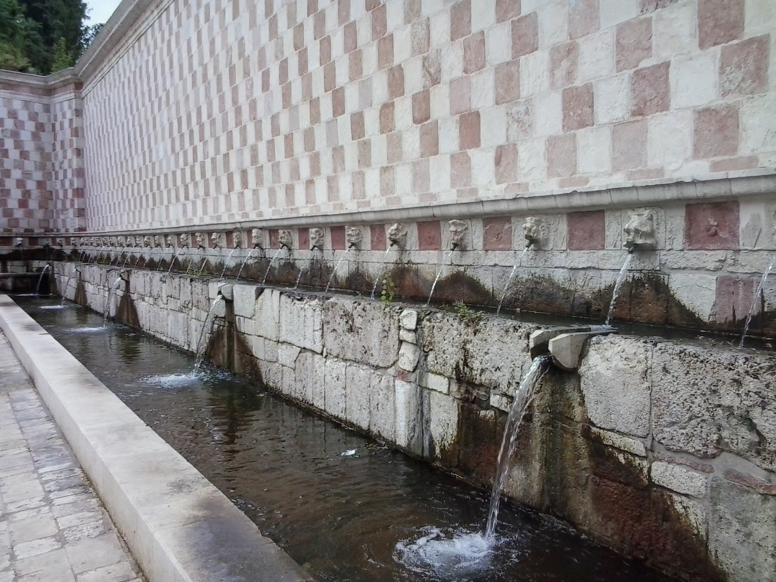 Fontane delle 99 in Aquila